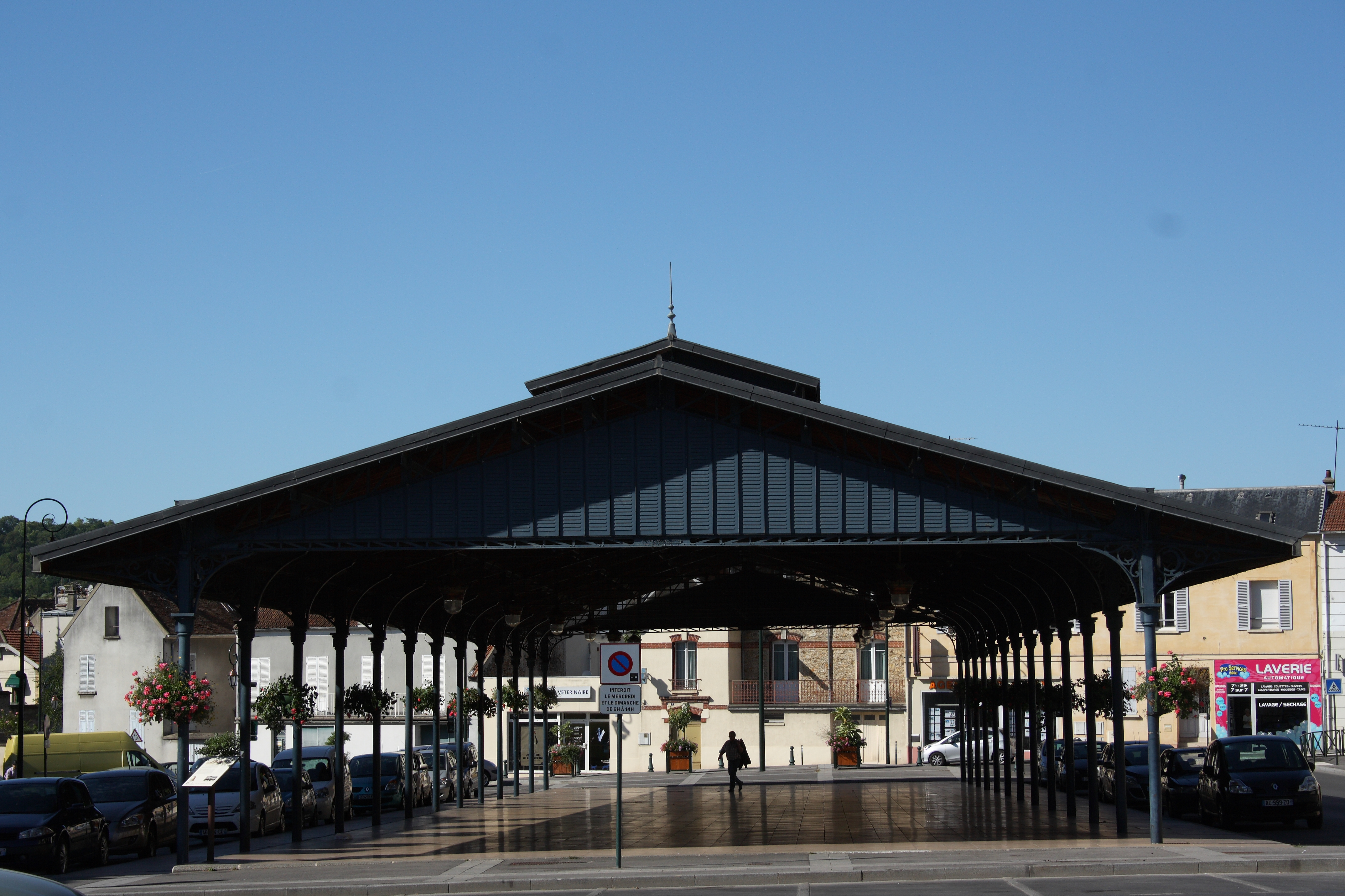 Halle aux fromages (Markthalle) in Coulommiers im Département Seine-et-Marne in der Region Île-de-France (Frankreich)